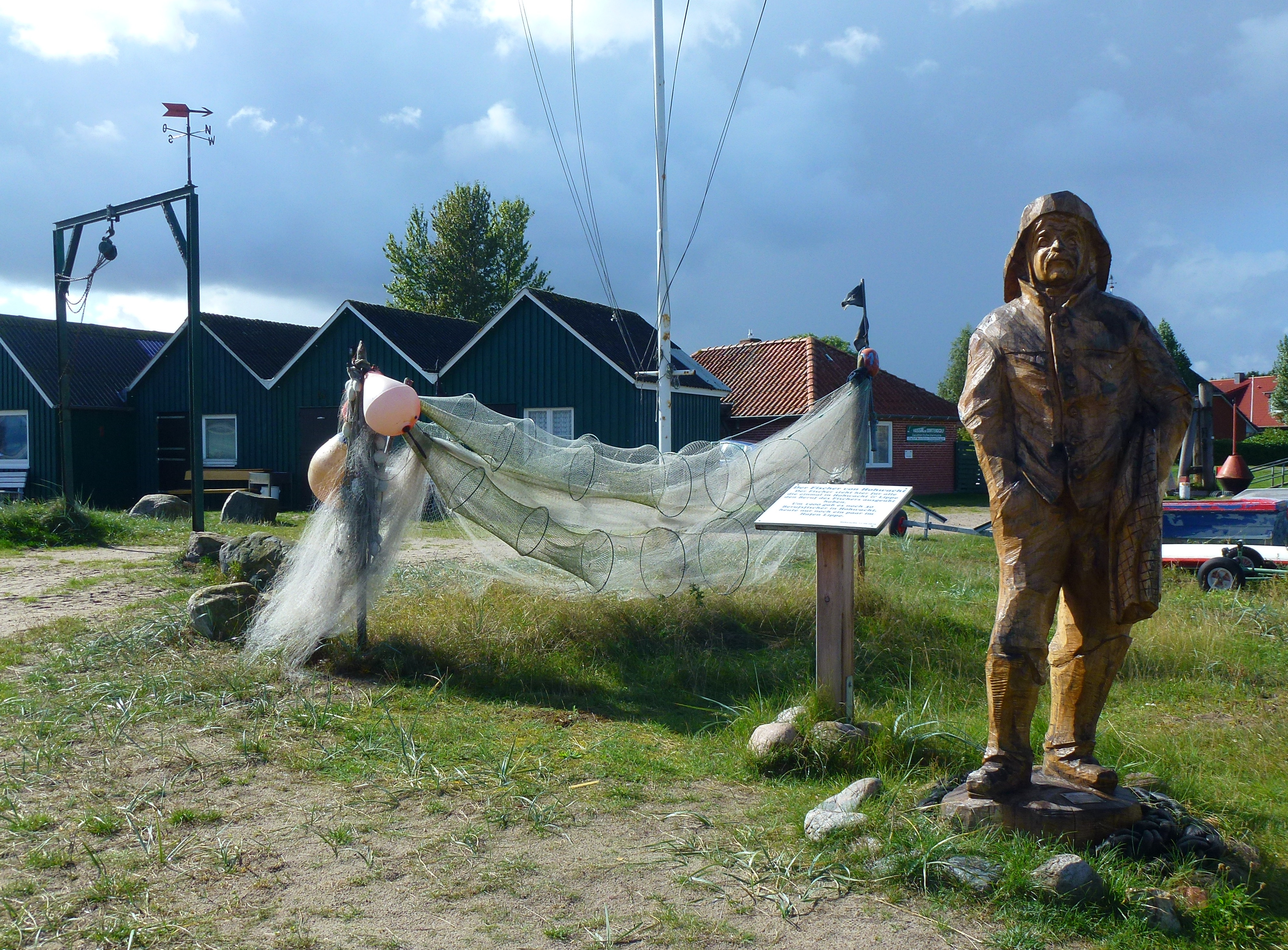 Hohwacht (Ostsee)